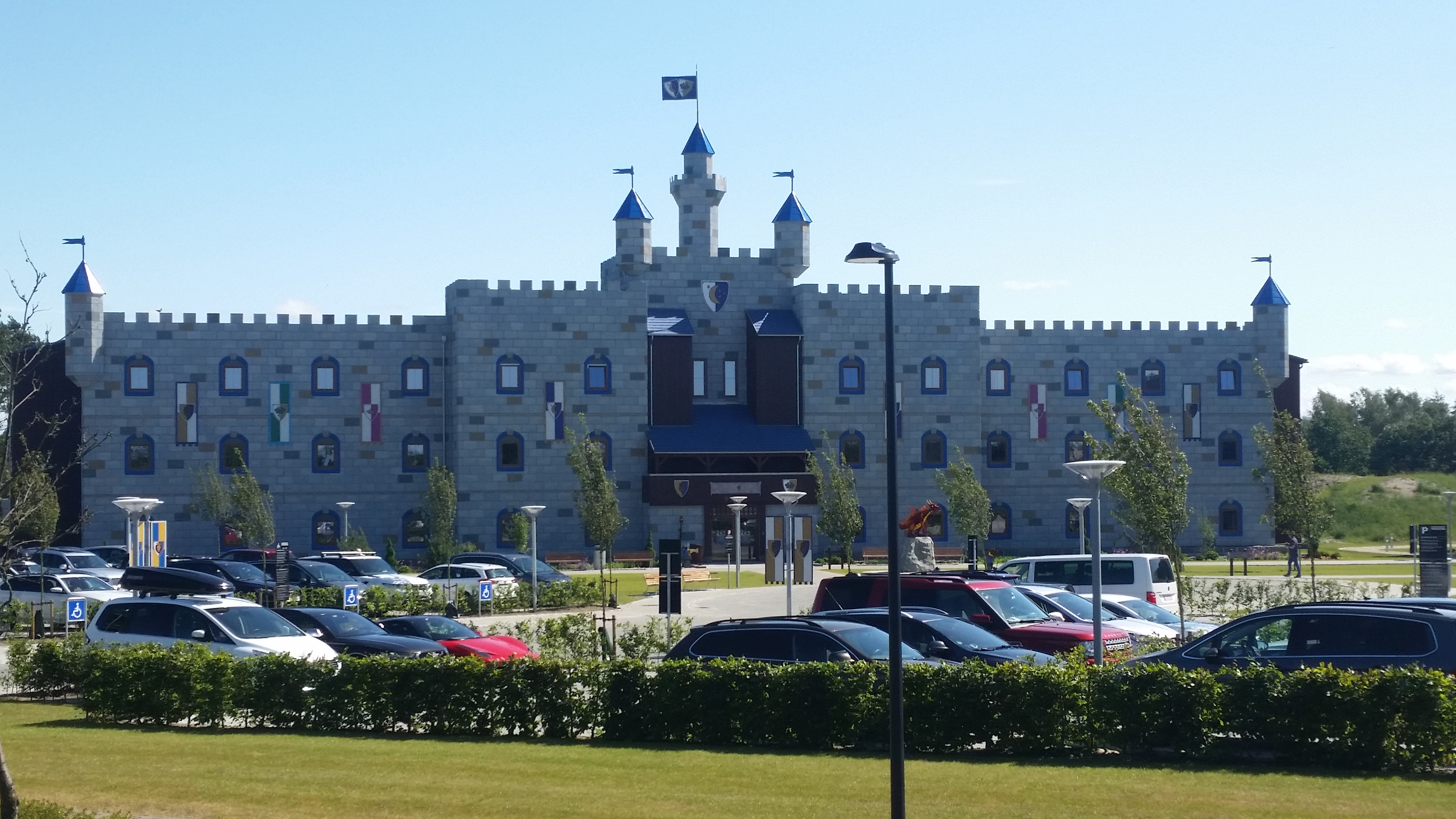 Hôtel du parc d’attraction Legoland Billund